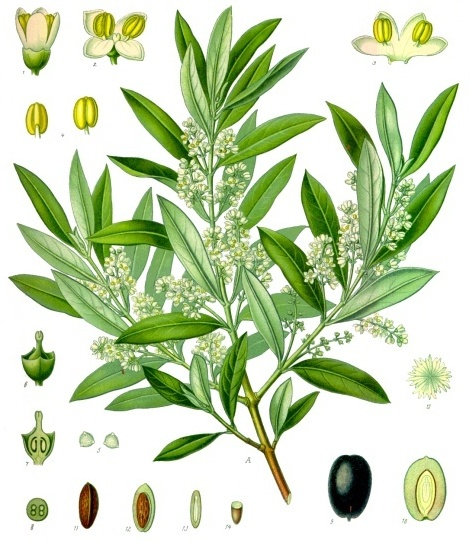 Olivenbaum. A blühender Zweig in natürl. Grösse; 1 ungeöffnete Blüthe, vergrössert; 2 geöffnete Blüthe, desgl.; 3 gespaltene und auseinandergelegte Blüthe, desgl.; 4 Staubgefässe von Vorder- und Rückseite, desgl.; 5 Pollen, desgl.; 6 abgeblühte Blüthe ohne Krone, desgl.; 7 dieselbe im Längsschnitt, desgl.; 8 Fruchtknoten im Querschnitt, desgl.; 9 Steinfrucht, natürl. Grösse: 10 dieselbe im Längsschnitt, desgl.; 11 Steinschale, vom Rande aus gesehen, desgl.; 12 dieselbe im Längsschnitt, mit Same, desgl.; 13 Same, die schmale Seite im Längsschnitt, desgl.; 14 derselbe im Querschnitt.